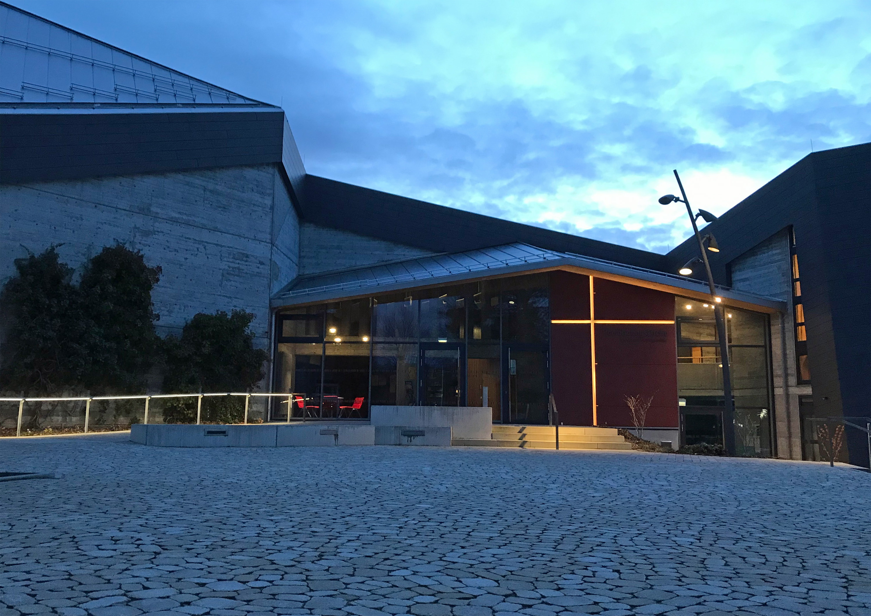 Versöhnungskirche Oberkochen - 2018 neu gestalteter Eingangsbereich in der Abenddämmerung